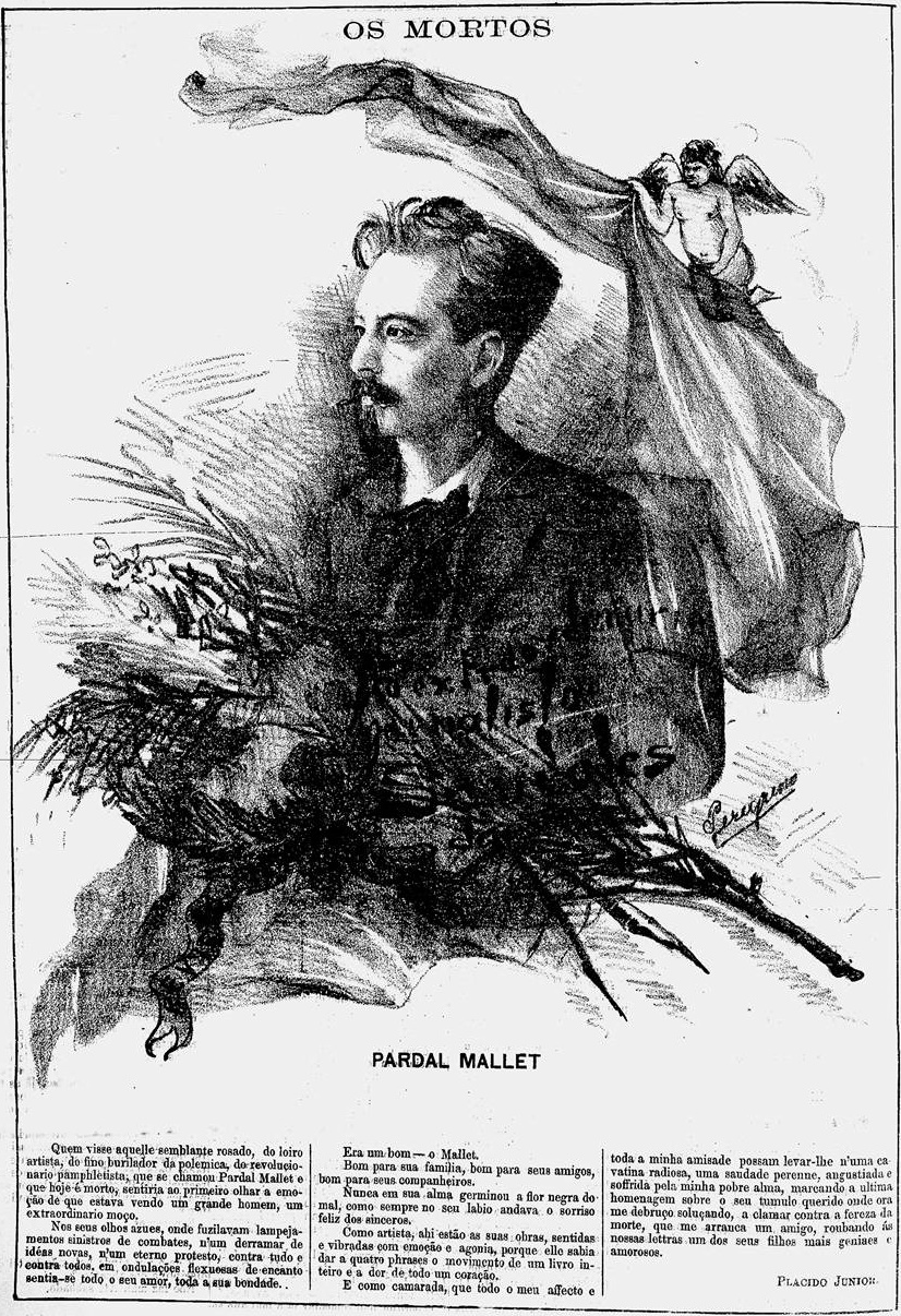 Pardal Mallet